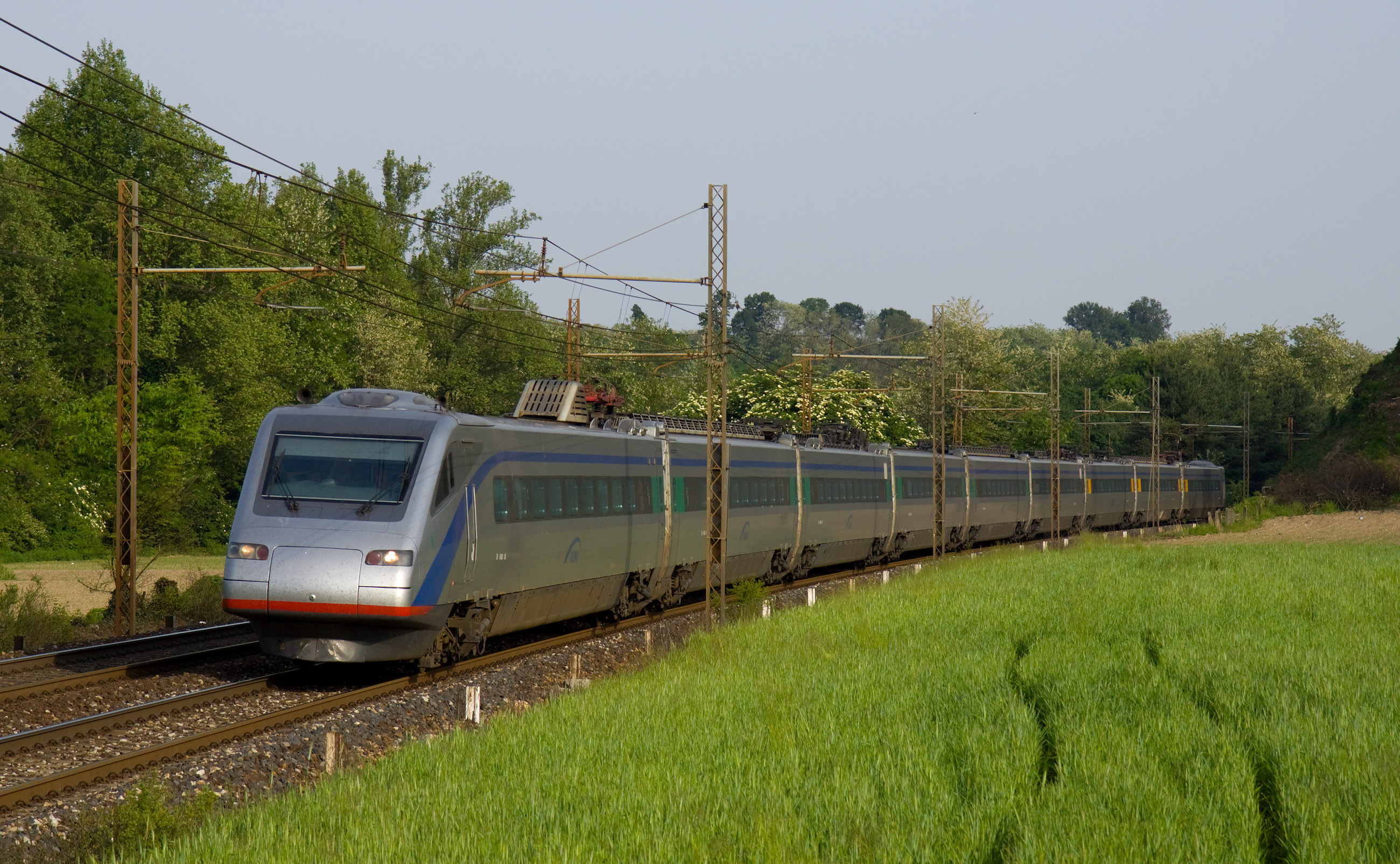 Elettrotreno ETR 470.8 della società Cisalpino in transito sulla ferrovia Chiasso-Milano, presso Camnago.